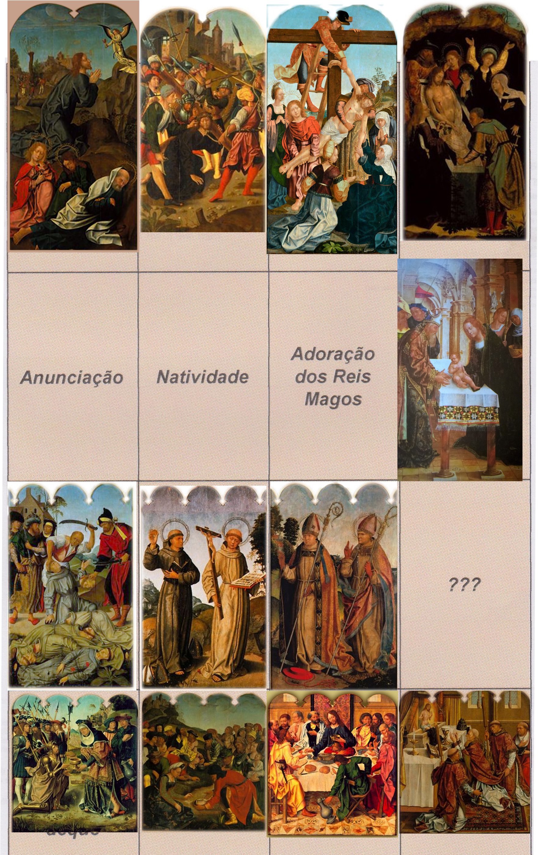 Políptico do Convento de São Francisco de Évora - Reconstituição conforme Reynaldo dos Santos, citado por Fernando Baptista Pereira, Imagens e Histórias de devoção. Espaço, Tempo e Narrativa na Pintura Portuguesa do Renascimento (1450-1550), Tese de doutoramento em Ciências da Arte, Faculdade de Belas Artes da Universidade de Lisboa, policopiado, 2001, Volume II, pág. 55.